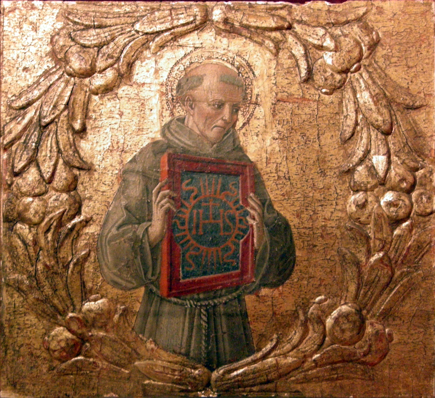 San Bernardino